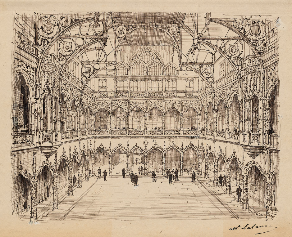 Innenansicht der Börse (Handelsbeurs) von Antwerpen. Feder in Schwarz. 21,3 x 26 cm. Mit Stempelsignatur unten rechts.